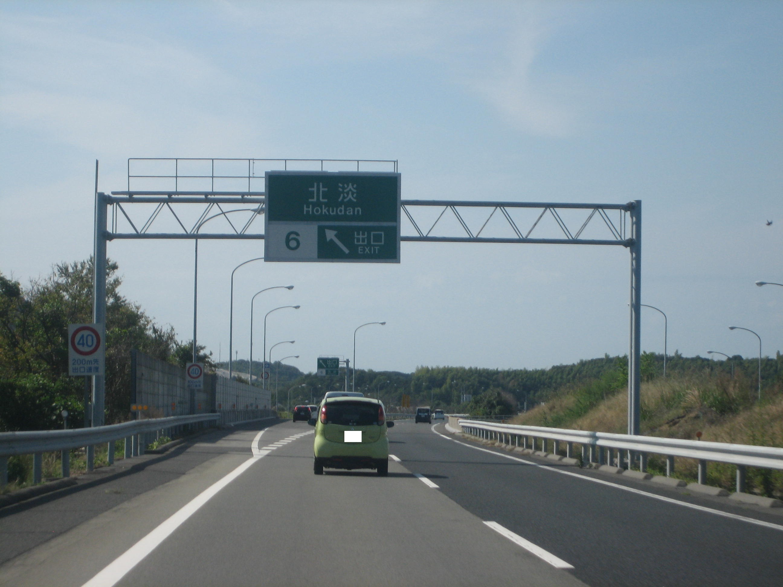 北淡IC